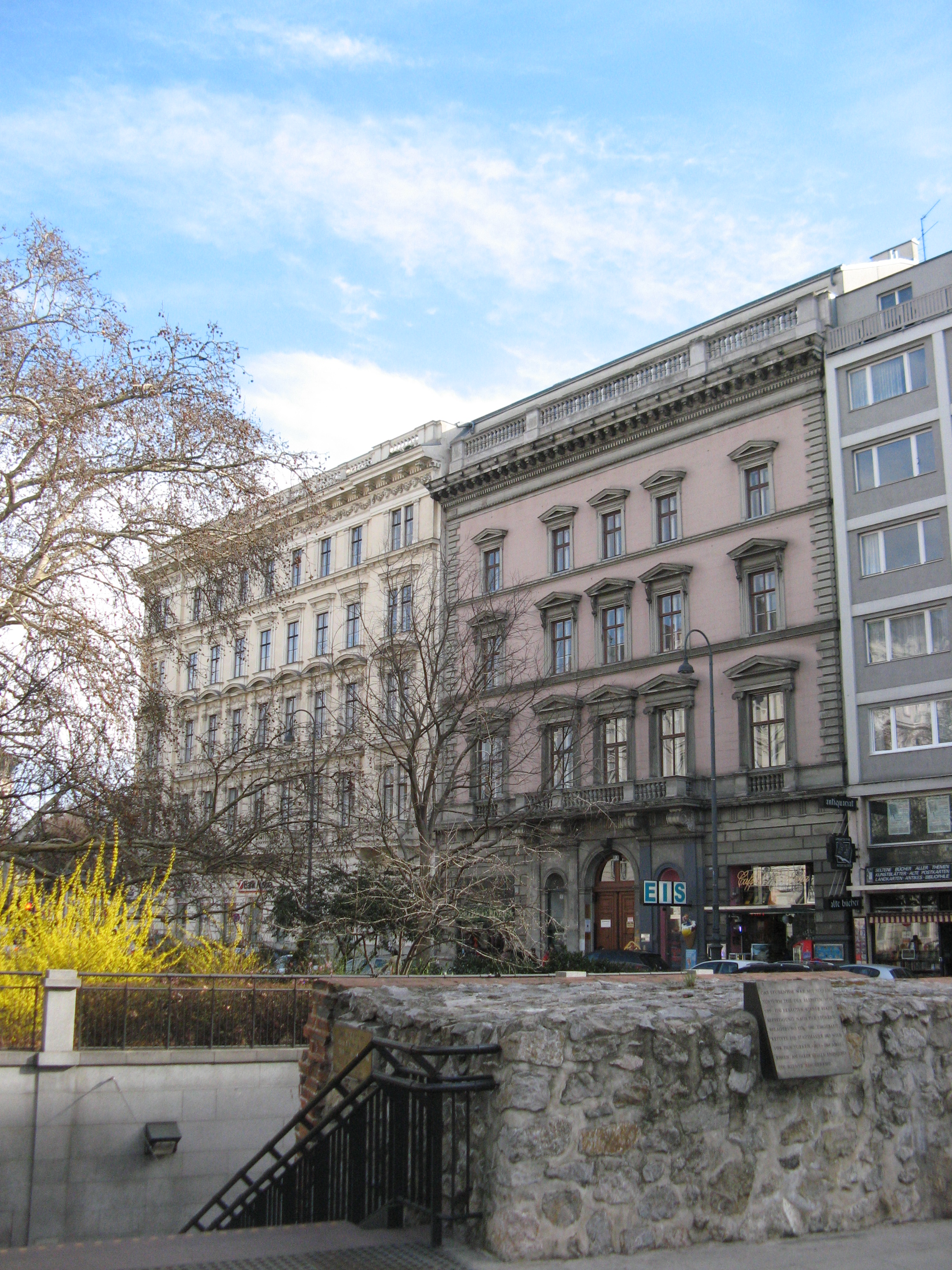 Blick auf Hausnummer 1 und 2, Dr.-Karl-Lueger-Platz, Wien-Innere Stadt